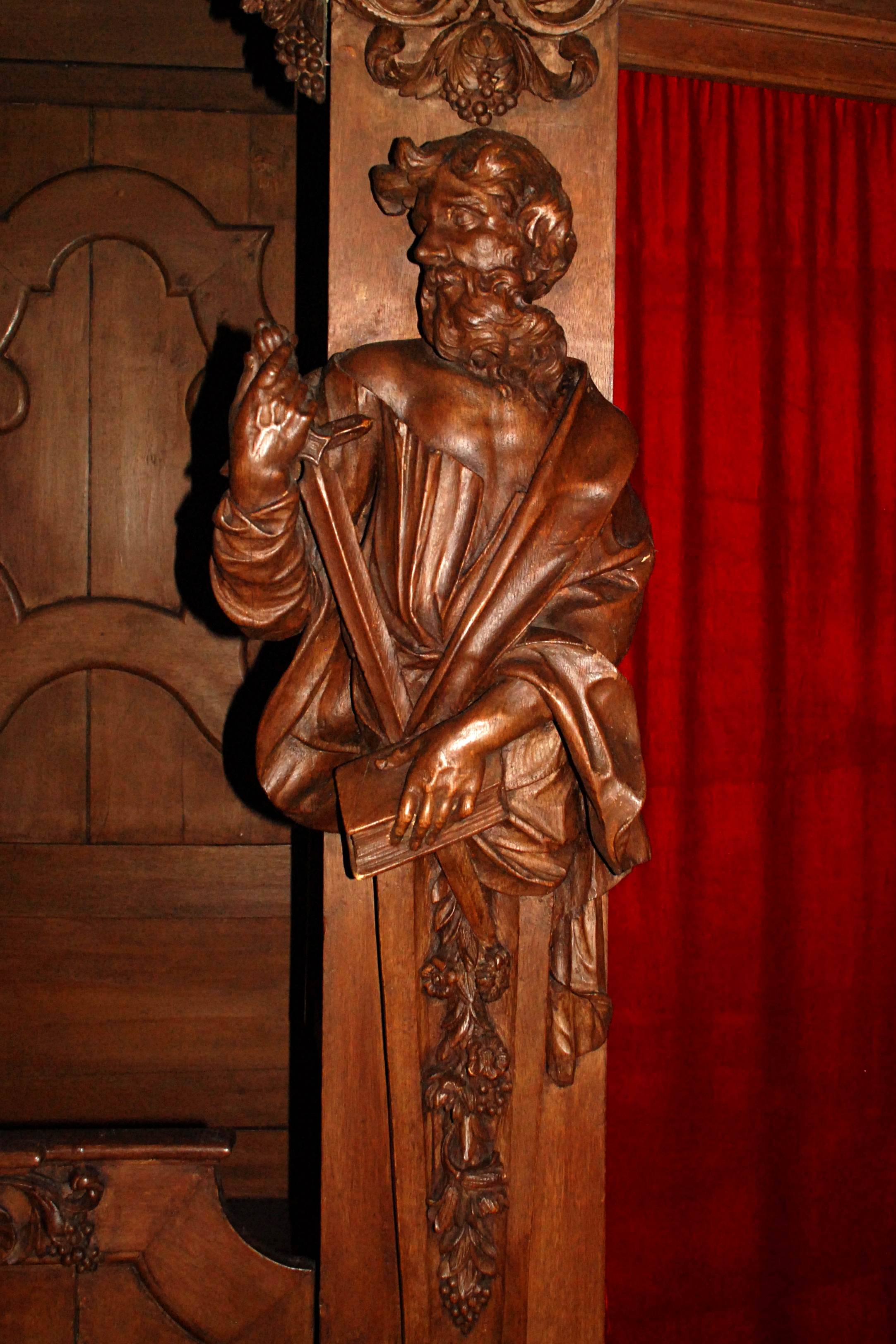 Belgique - Brabant wallon - Ottignies - église Saint-Rémi - confessionnal : saint Paul